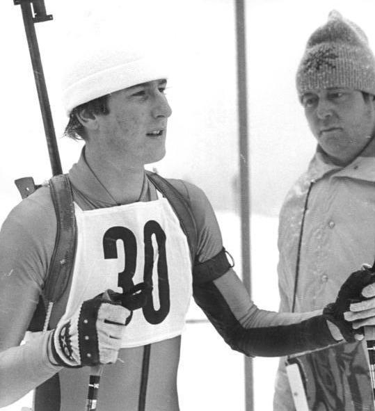 Andre Sehmisch ADN-ZB Schaar 2.3.84 Frankreich: Junioren-Weltmeisterschaften im Biathlon- Titelverteidiger Andre Sehmisch (DDR- Foto von den DDR-Juniorenmeisterschaften 1984 in Oberhof) kam am 1.3.84 in Chamonix über 15km erneut zum Erfolg.